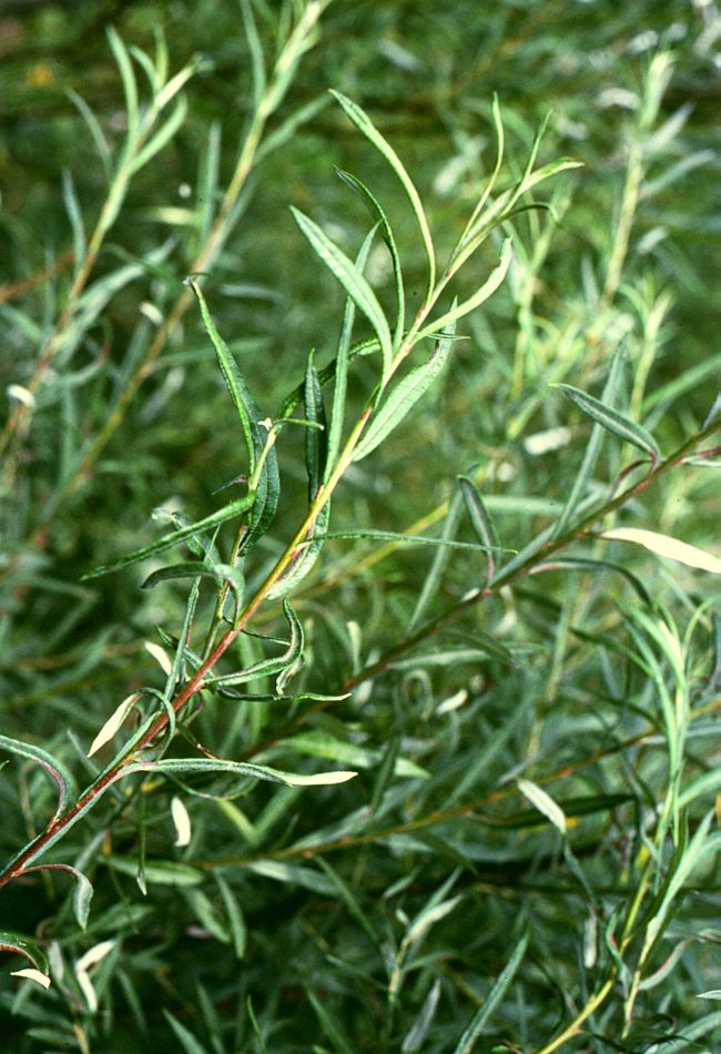 Lavendel-Weide (Salix elaeagnos), Weidengewächse (Salicaceae) - Österreich/Austria/Autriche: Niederösterreich, Erlauftal E Gaming, Vordere Tormäuer, Toter Mann